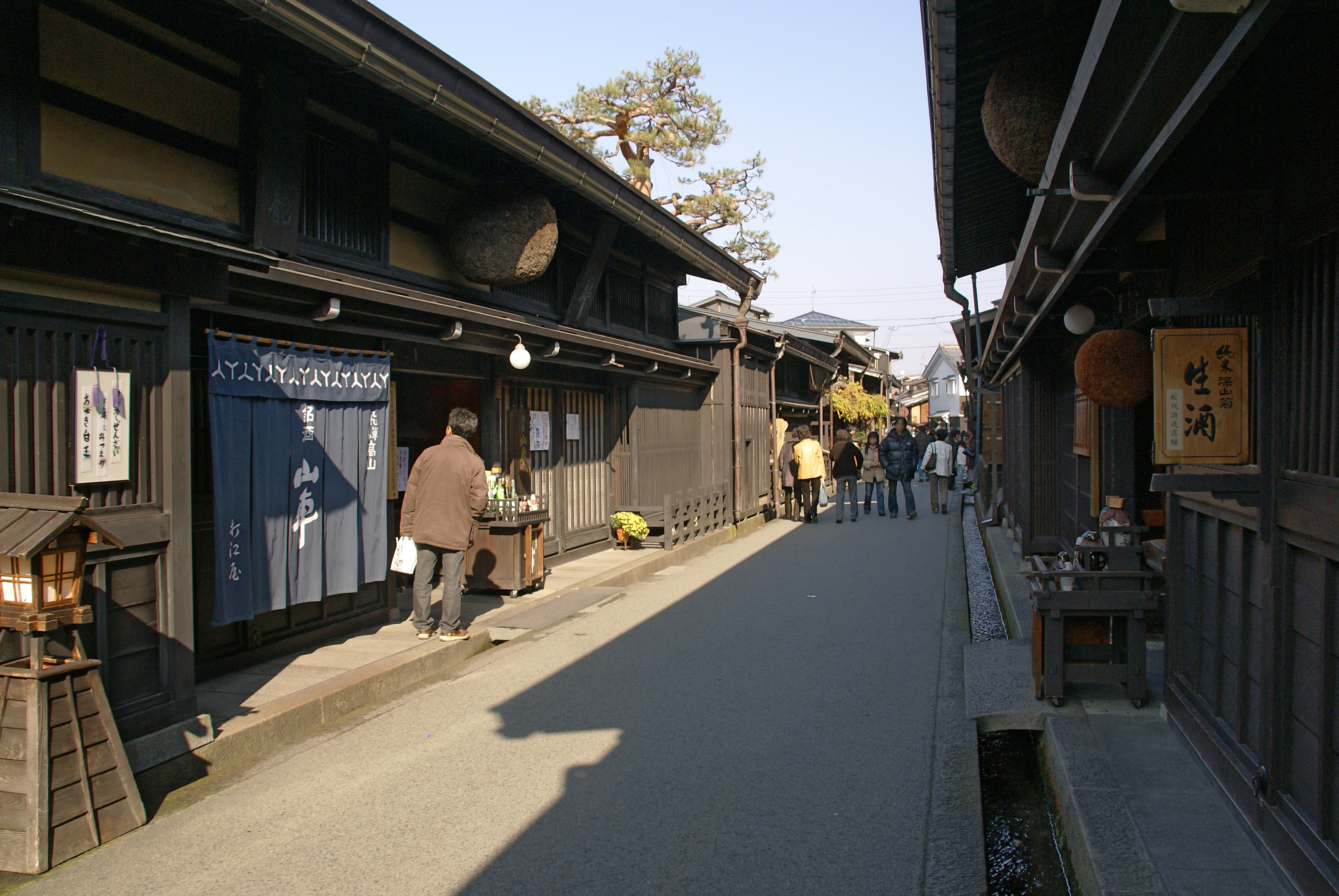 Sanmachi in Takayama, Gifu prefecture, Japan